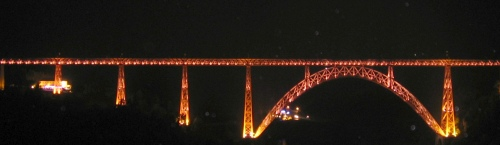 Garabit viaduc at night